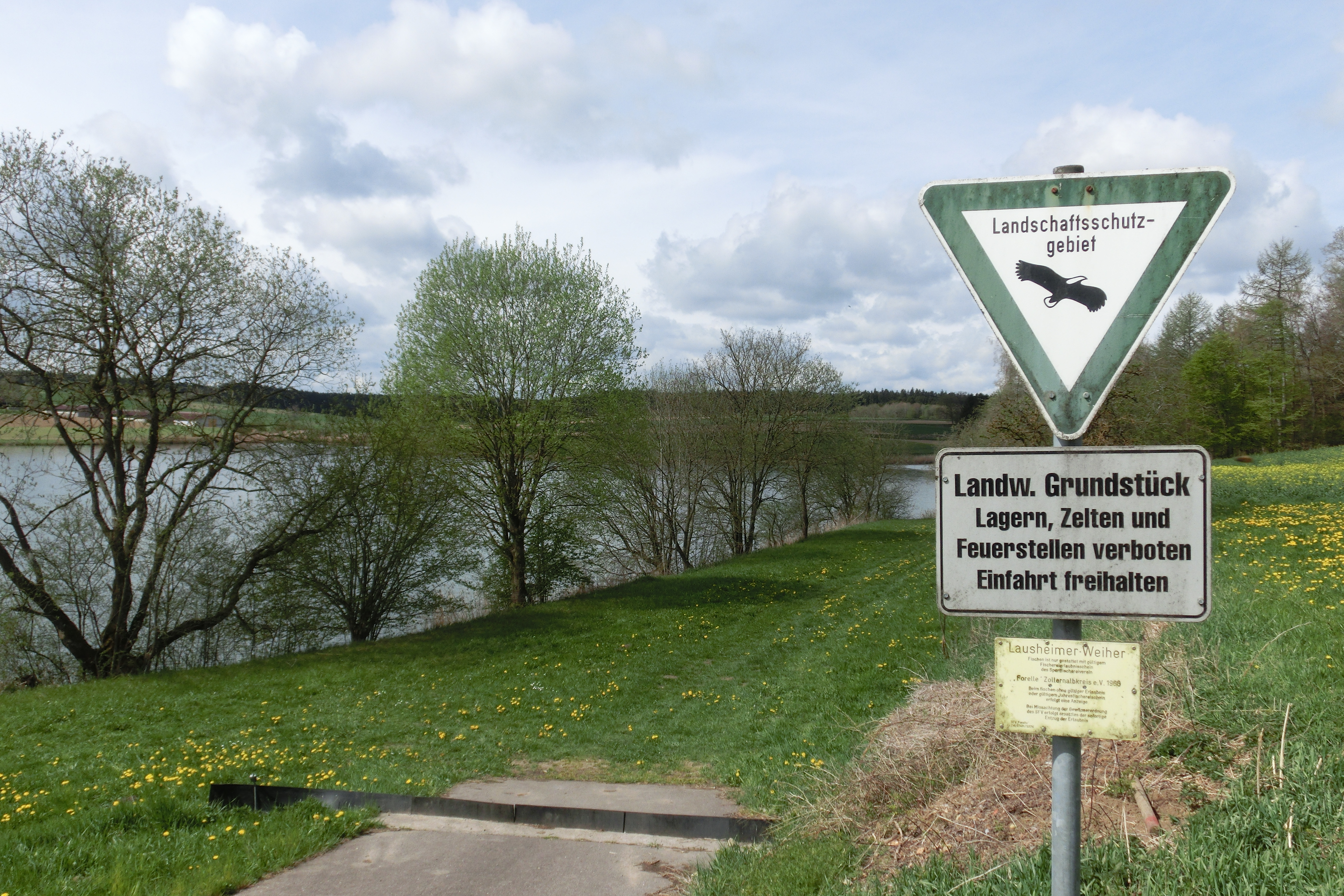 Deutschland - Baden-Württemberg - Landkreis Sigmaringen - Ostrach - Lausheim: Lausheimer Weiher